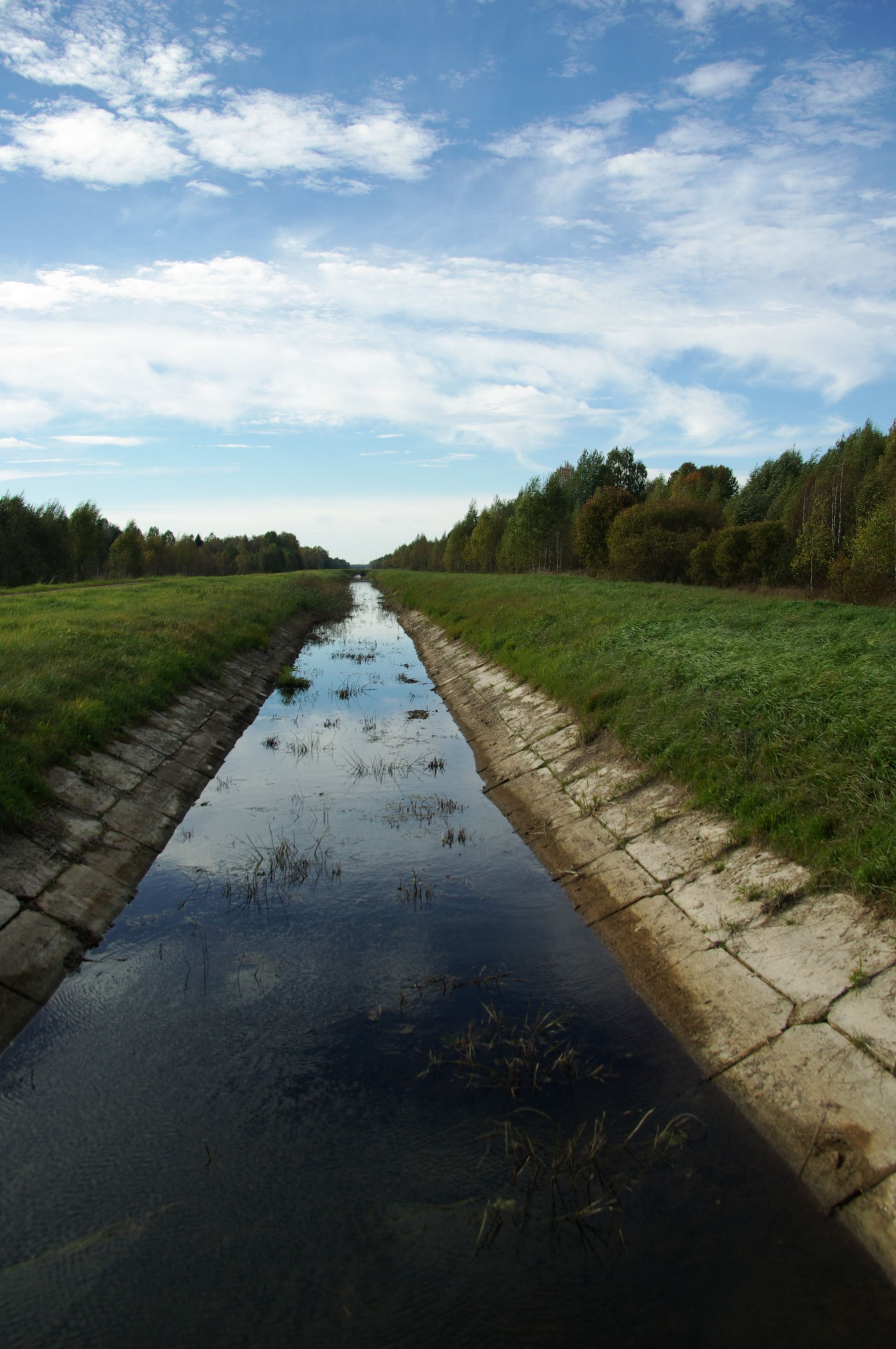 Harju maakond,Rae vald,Suursoo küla,koht kus Leivajõgi voolab kanali alt läbi